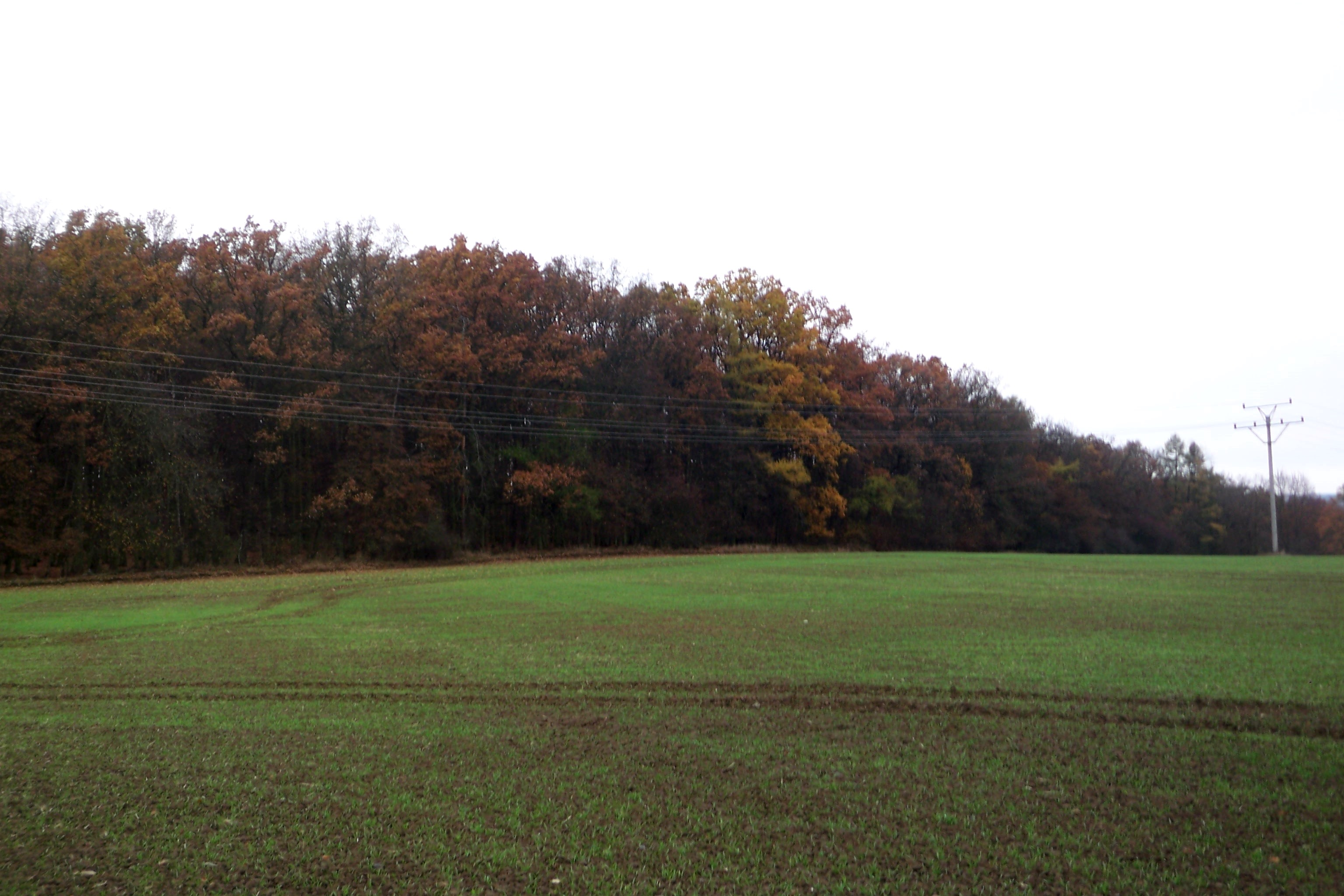 Celkový pohled na přírodní rezervaci Zlín a její okolí.